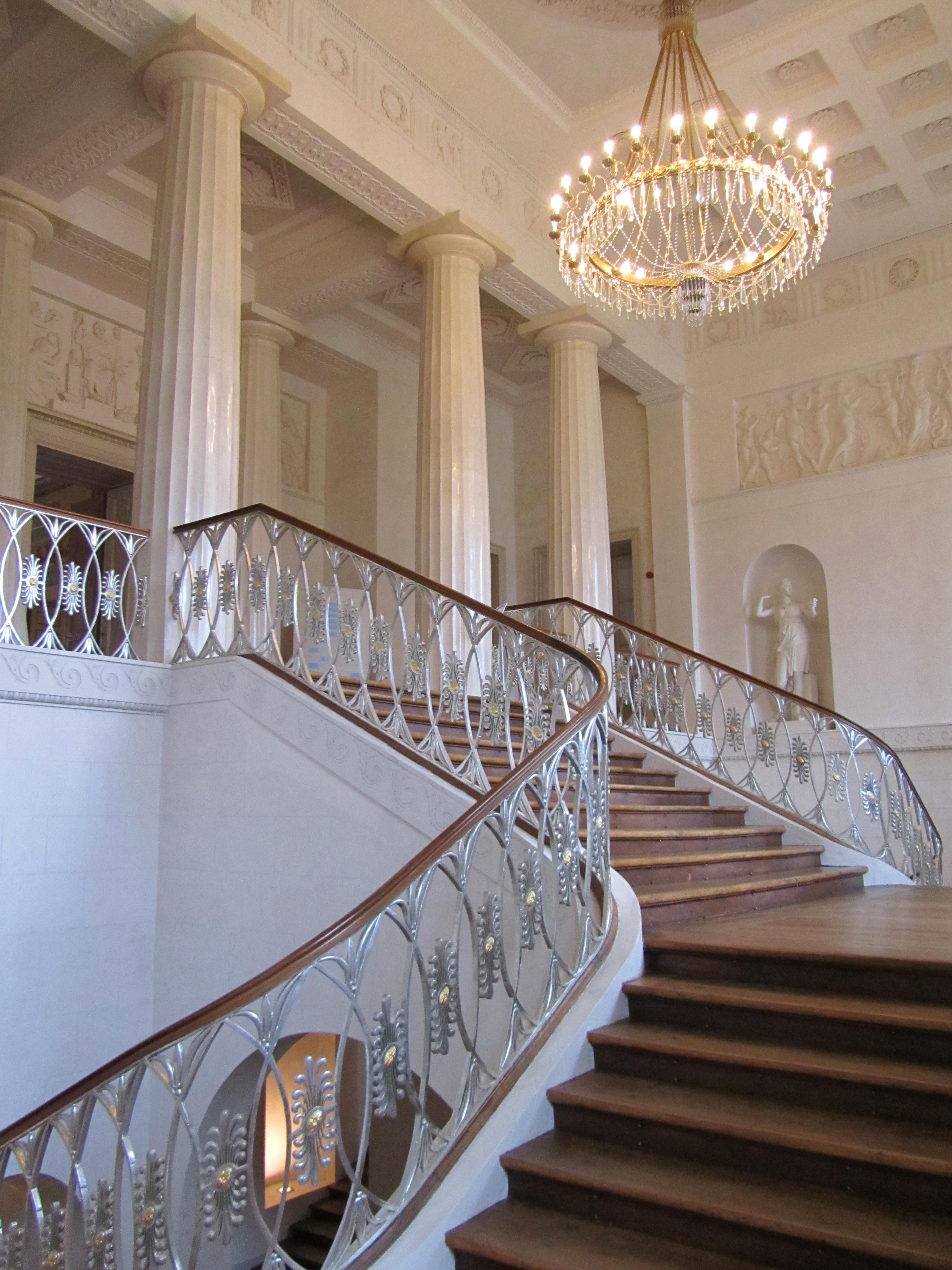 Das Gentzsche Treppenhaus im Schloss Weimar.